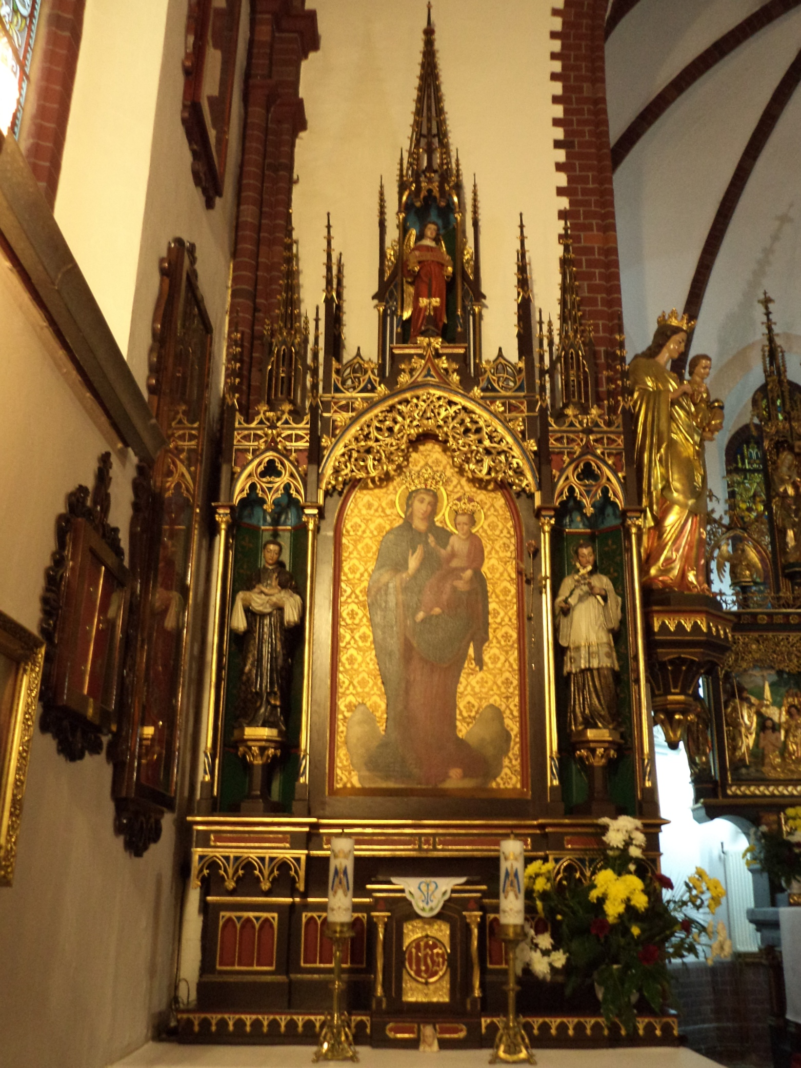 Cudowny obraz Matki Bożej Uzdrowienie Chorych w lewej nawie bocznej ołtarza kościoła pw. św. Kamila w Tarnowskich Górach